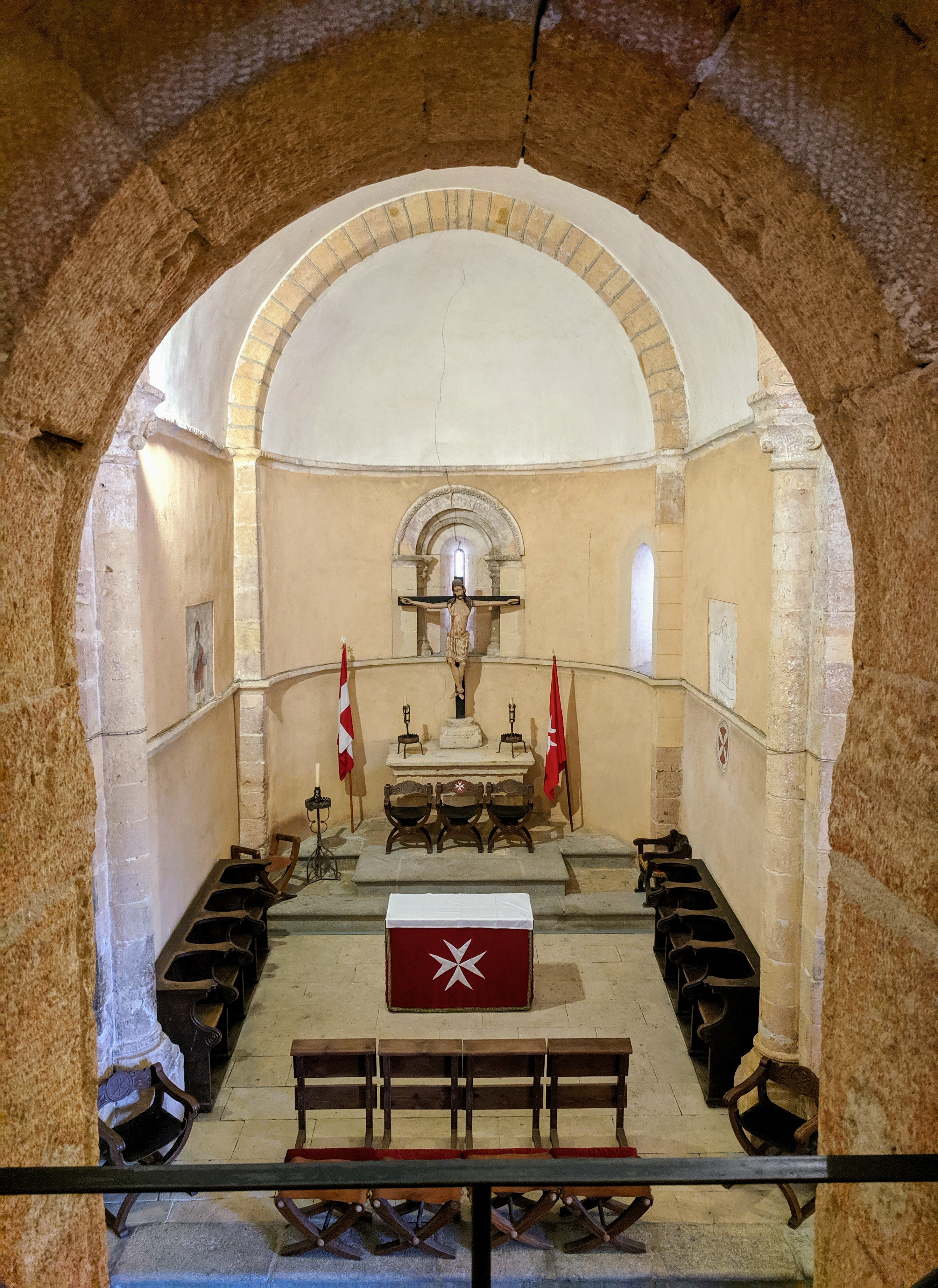 Interior de la iglesia de la Vera Cruz, Segovia (España).